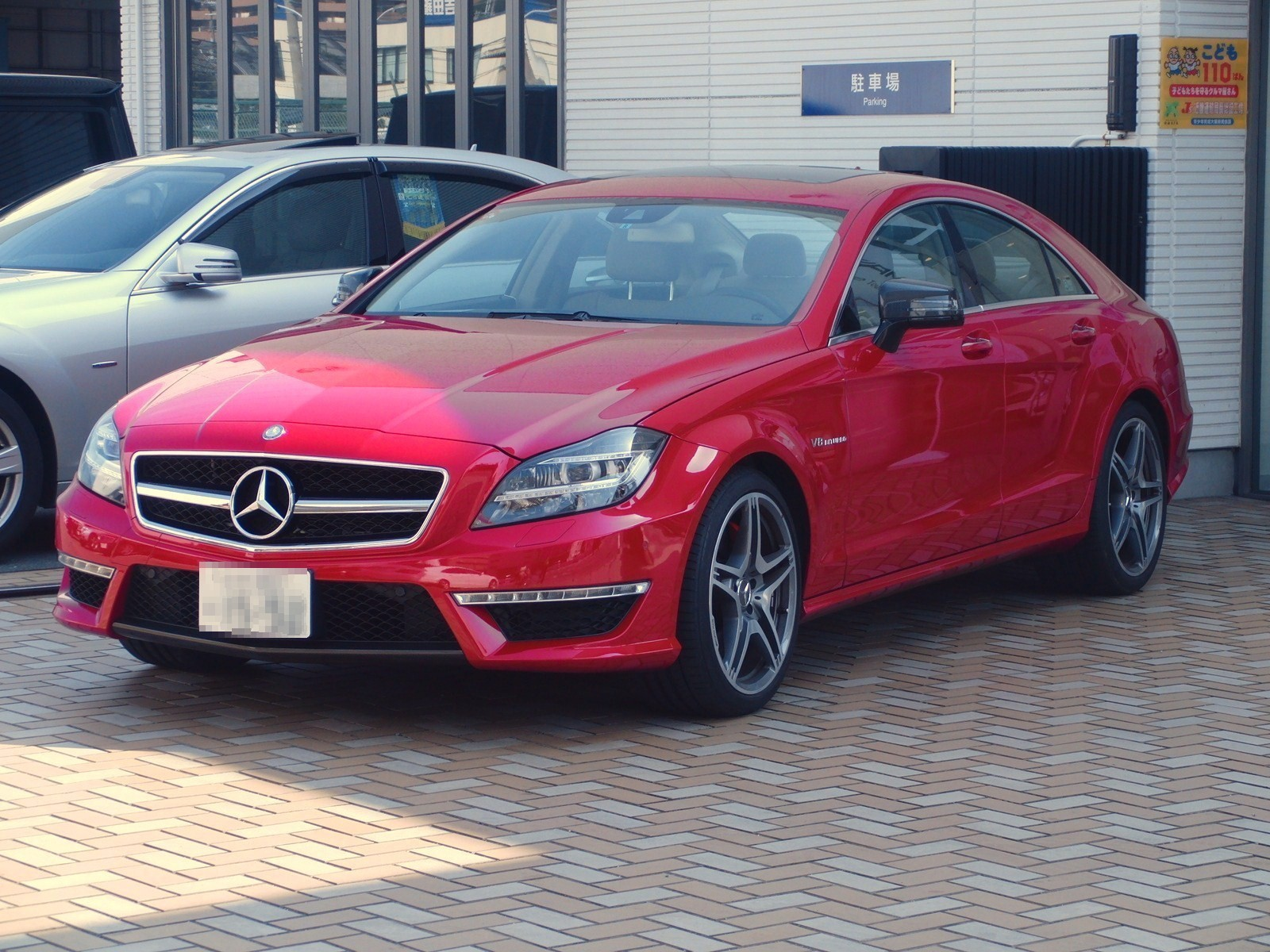 C218型メルセデス・ベンツCLS63 AMGをフロントから撮影。